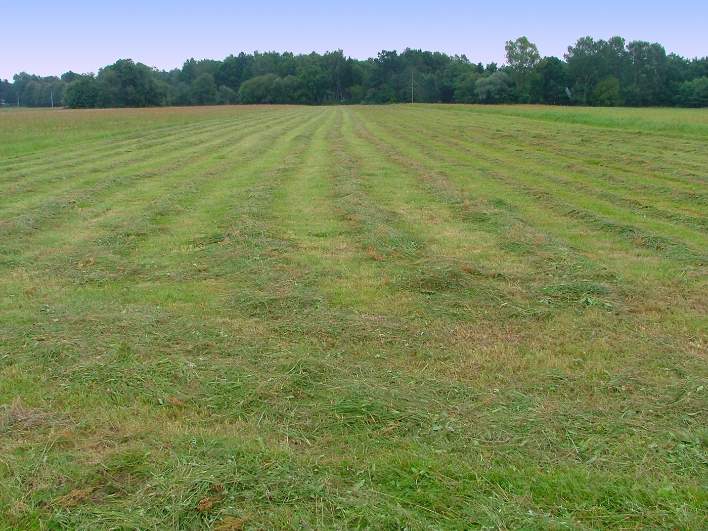 Łąka - Popowo Parcele (województwo mazowieckie, powiat wyszkowski, gmina Somianka nad Bugiem)